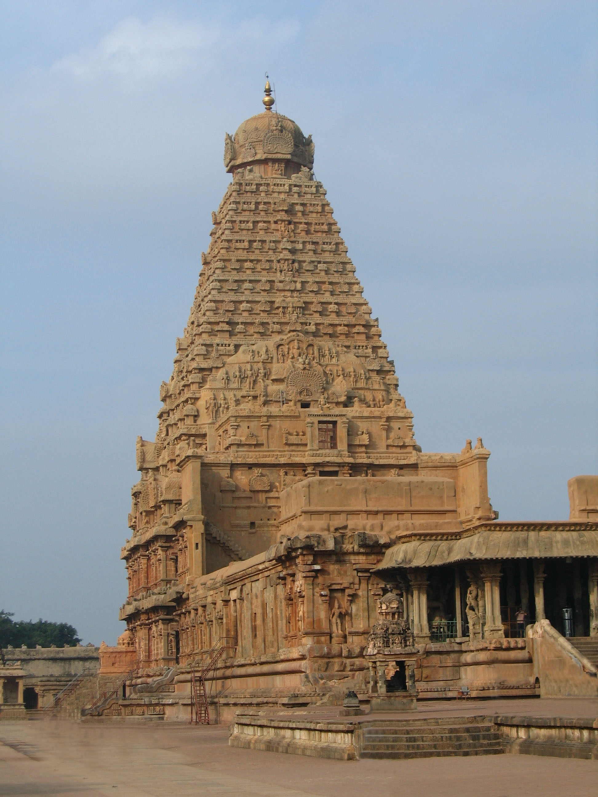 Thanjavur Brihadeeswara Temple